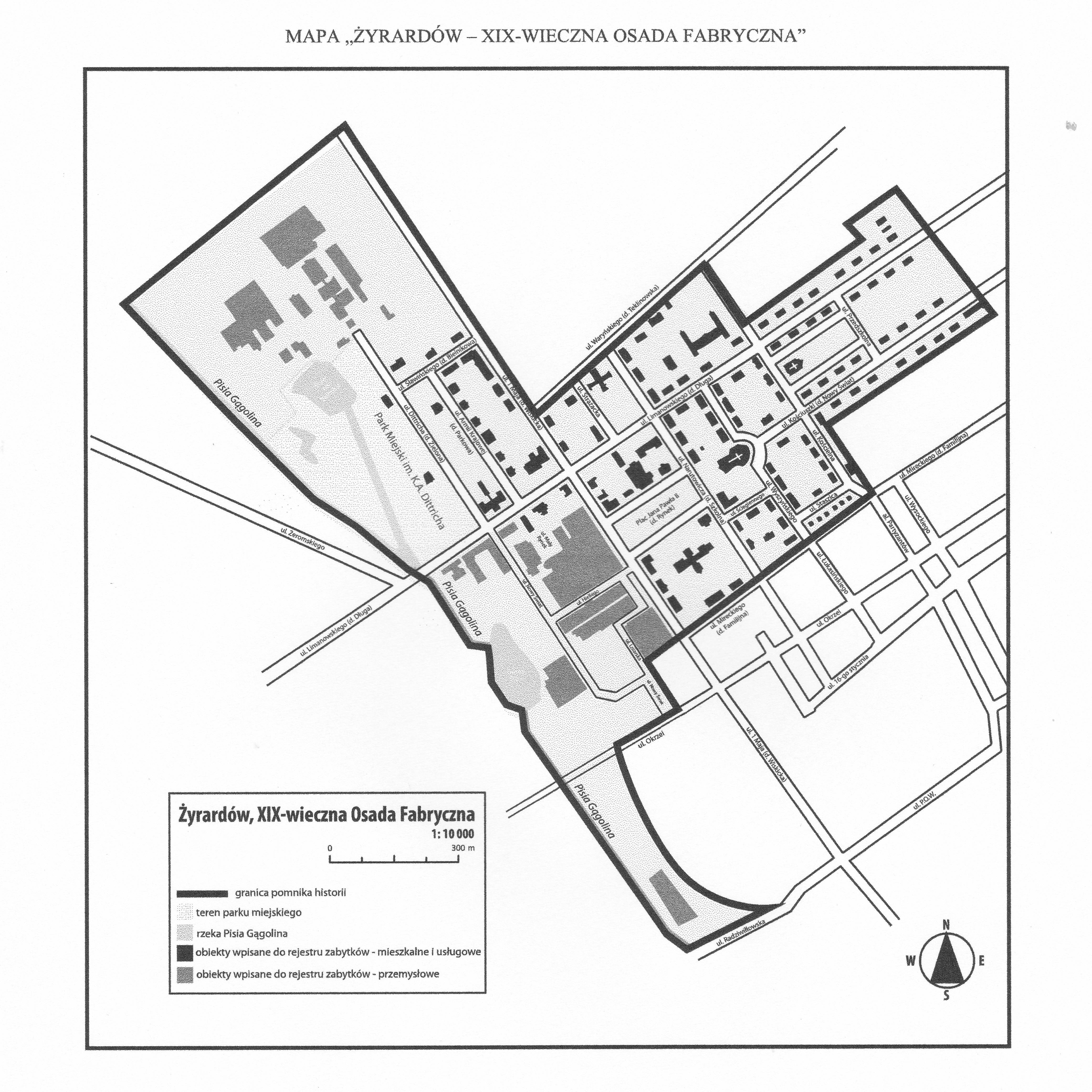 Karte des Denkmalschutzgebiets Żyrardów (gemäß Verordnung des Präsidenten der Republik Polen vom 17. Januar 2012)